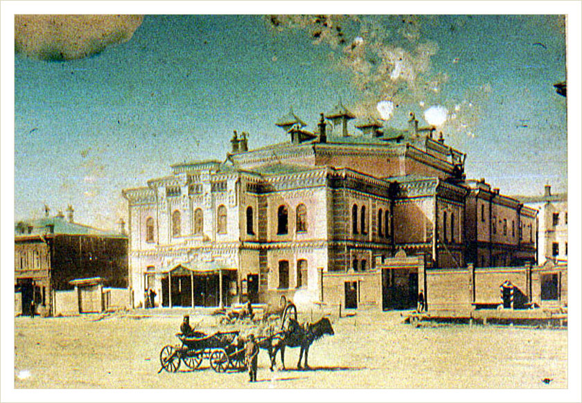 Фотография Королёвского театра в Томске